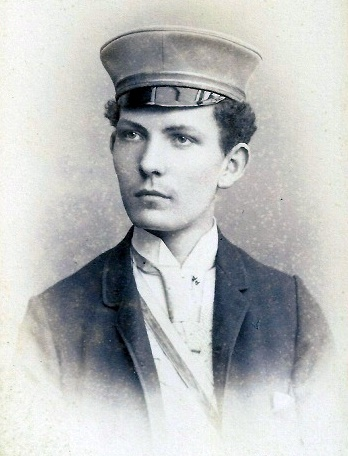 Porträtfotografie von Carl Woelck als Student in Leipzig; Mitglied des Corps Lusatia Leipzig